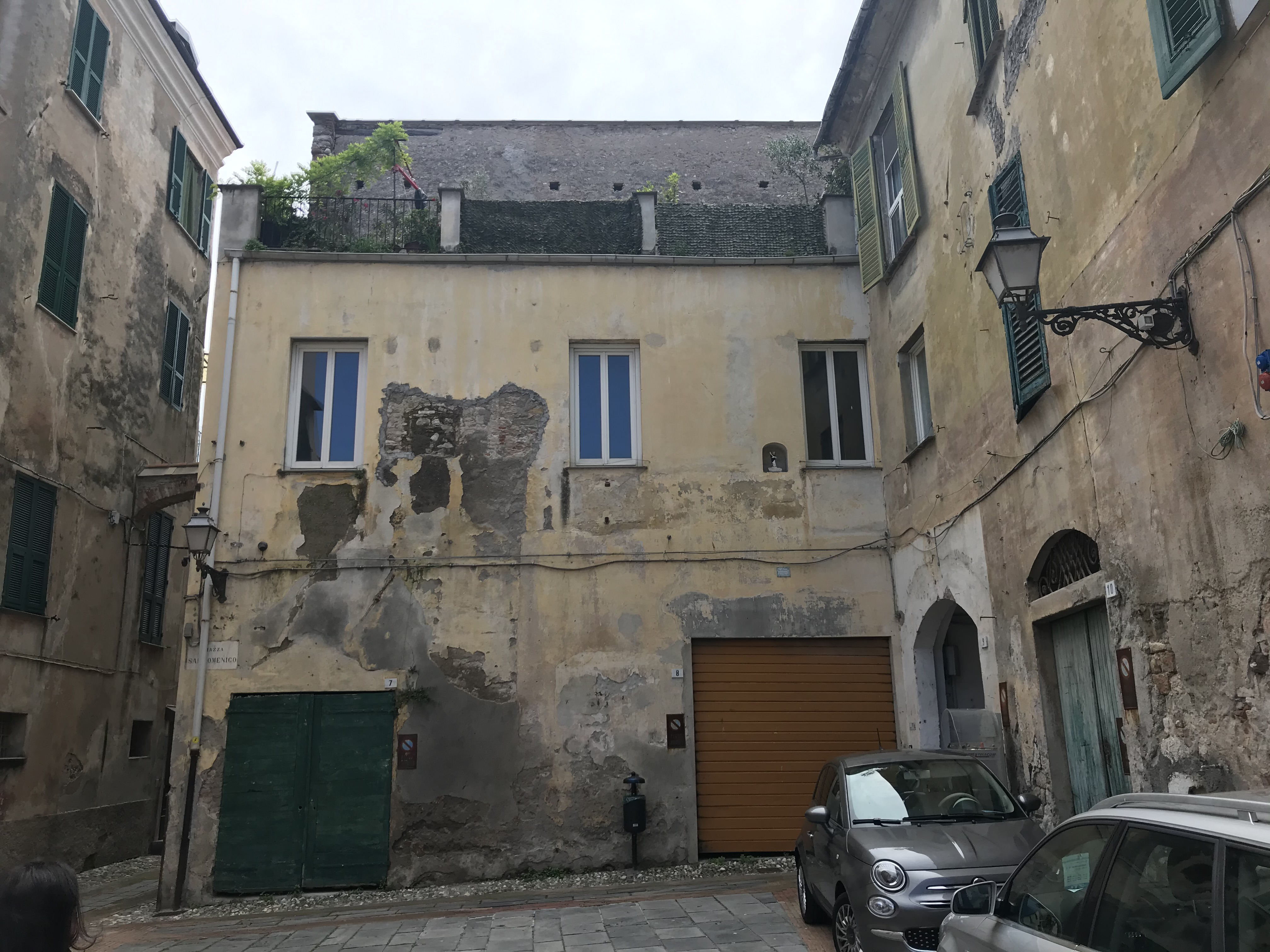 Facciata verso Piazza San Domenico, questa parte è stata realizzata probabilmente come ampliamento recente e ristrutturata nel corso del '900.